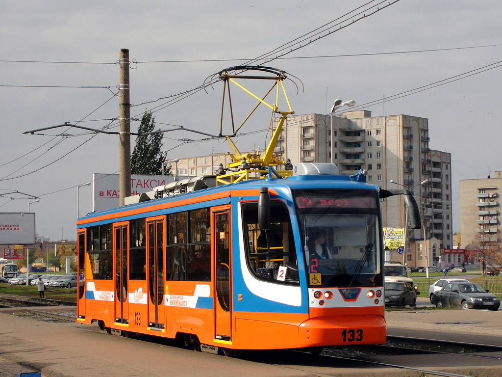 Tramwaj KTM-23 w Niżniekamsku, Rosja.